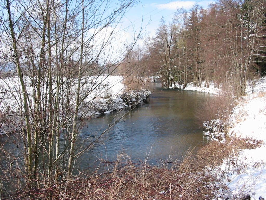 La Fave, affluent de la Meurthe, au pont de Sainte-Marguerite. Photo personnelle du 1er mars 2006. Copyright © Christian Amet